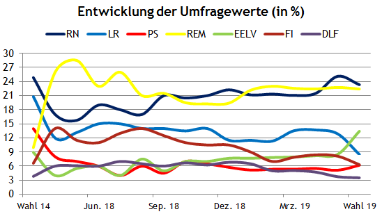 Umfrageverlauf Europawahl Frankreich 2019